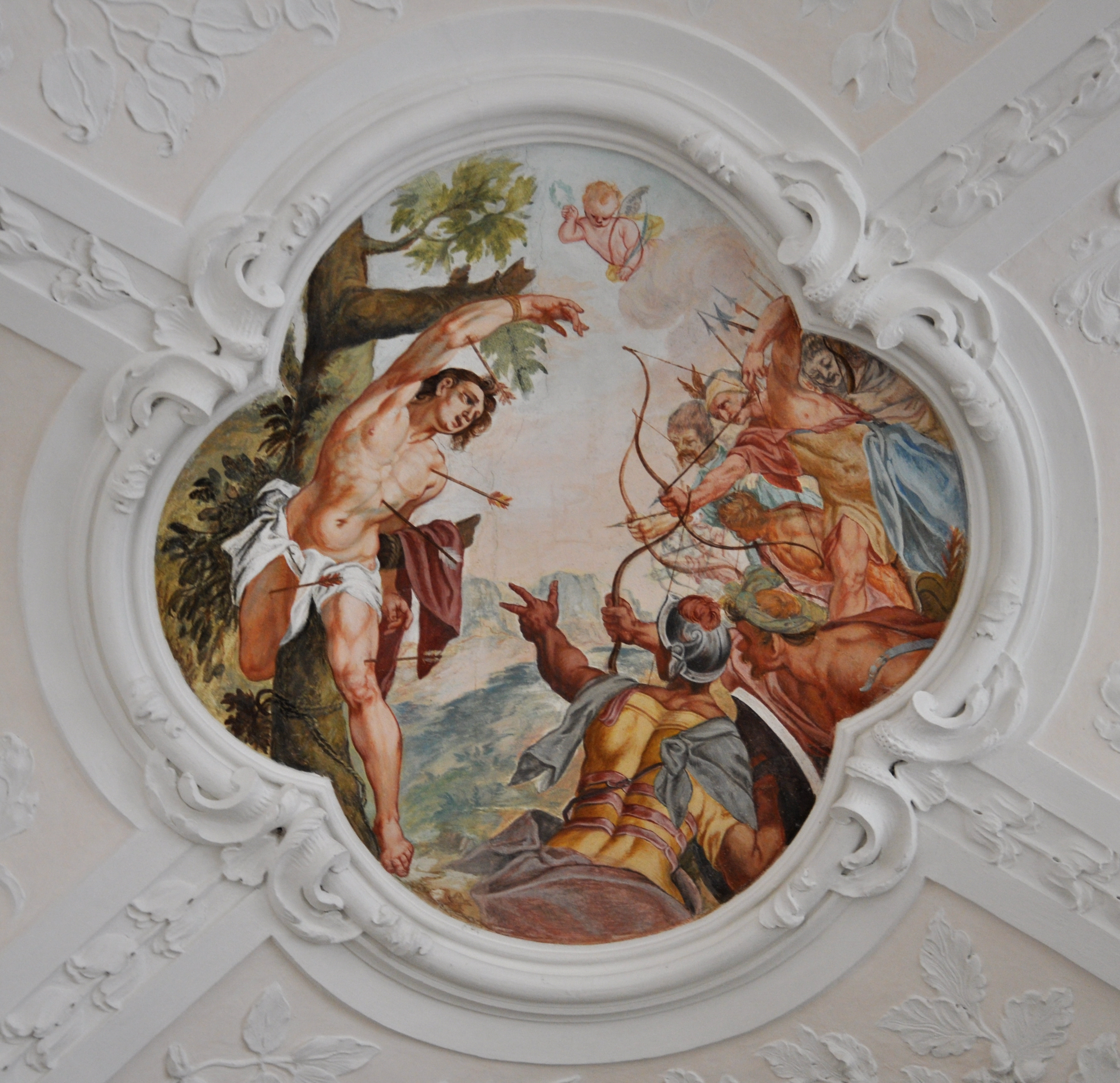 Buxheim, Kartause, Kartausenkirche St. Maria, Fresko am Lettnergewölbe, Martyrium des hl. Sebastian